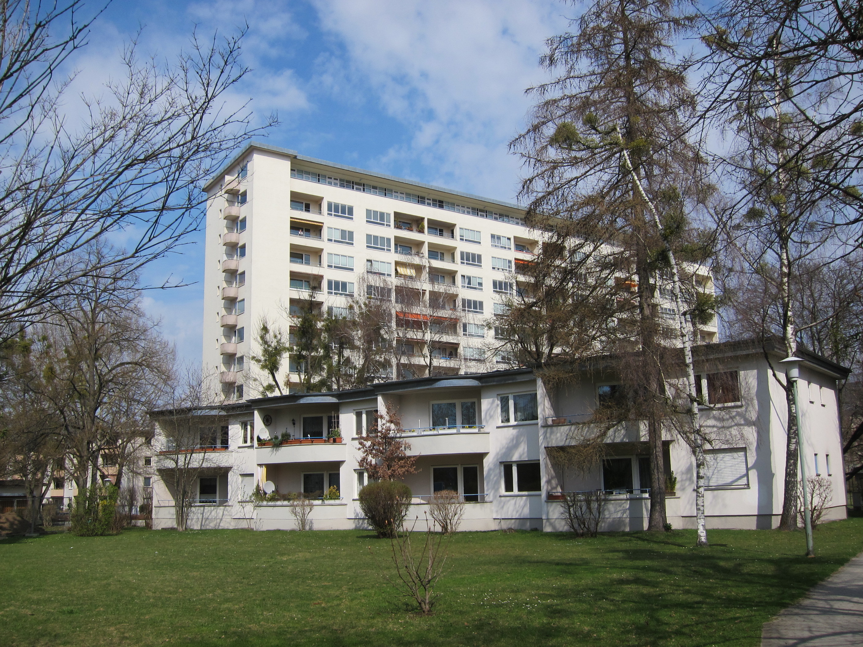 Schuckertstraße 10, 12 (Block 3). Zweigeschossiger Wohnblock, östliche Eingangsseite mit Küchenloggien, Westfassade mit abgeschrägten Balkonen.